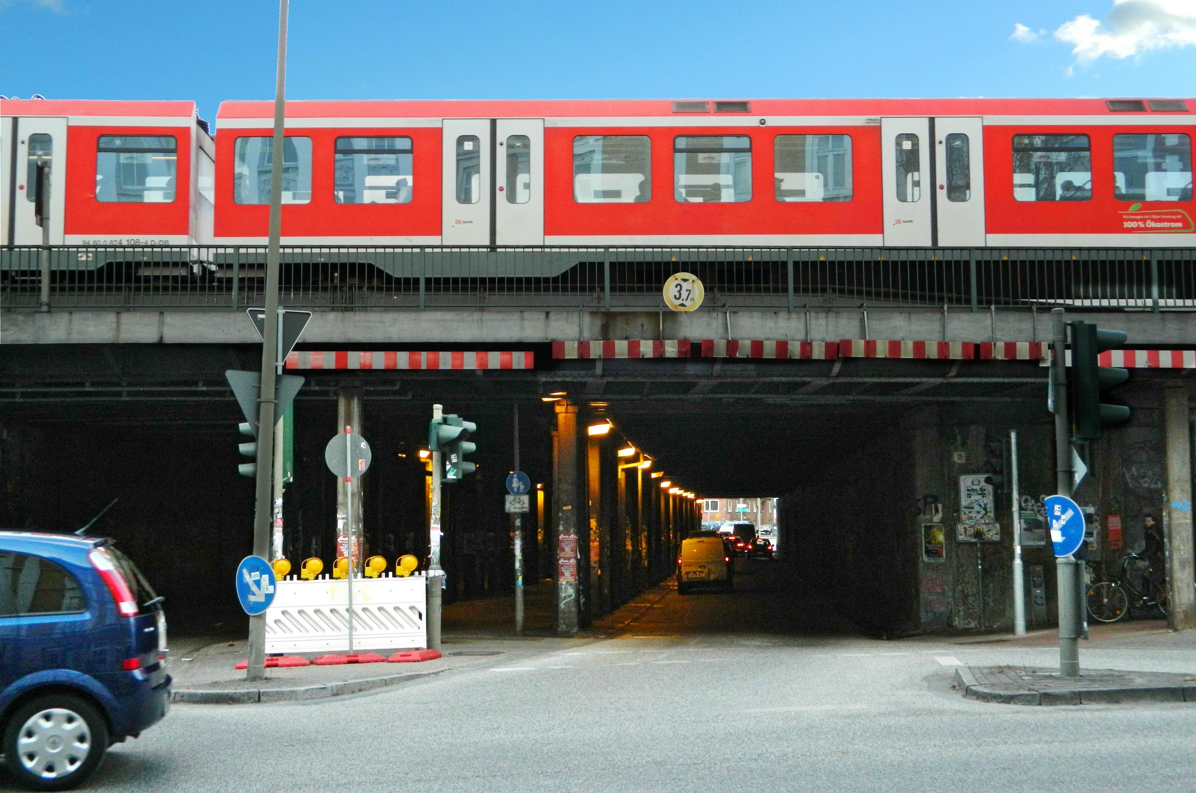 Tunnel unter den Bahngleisen